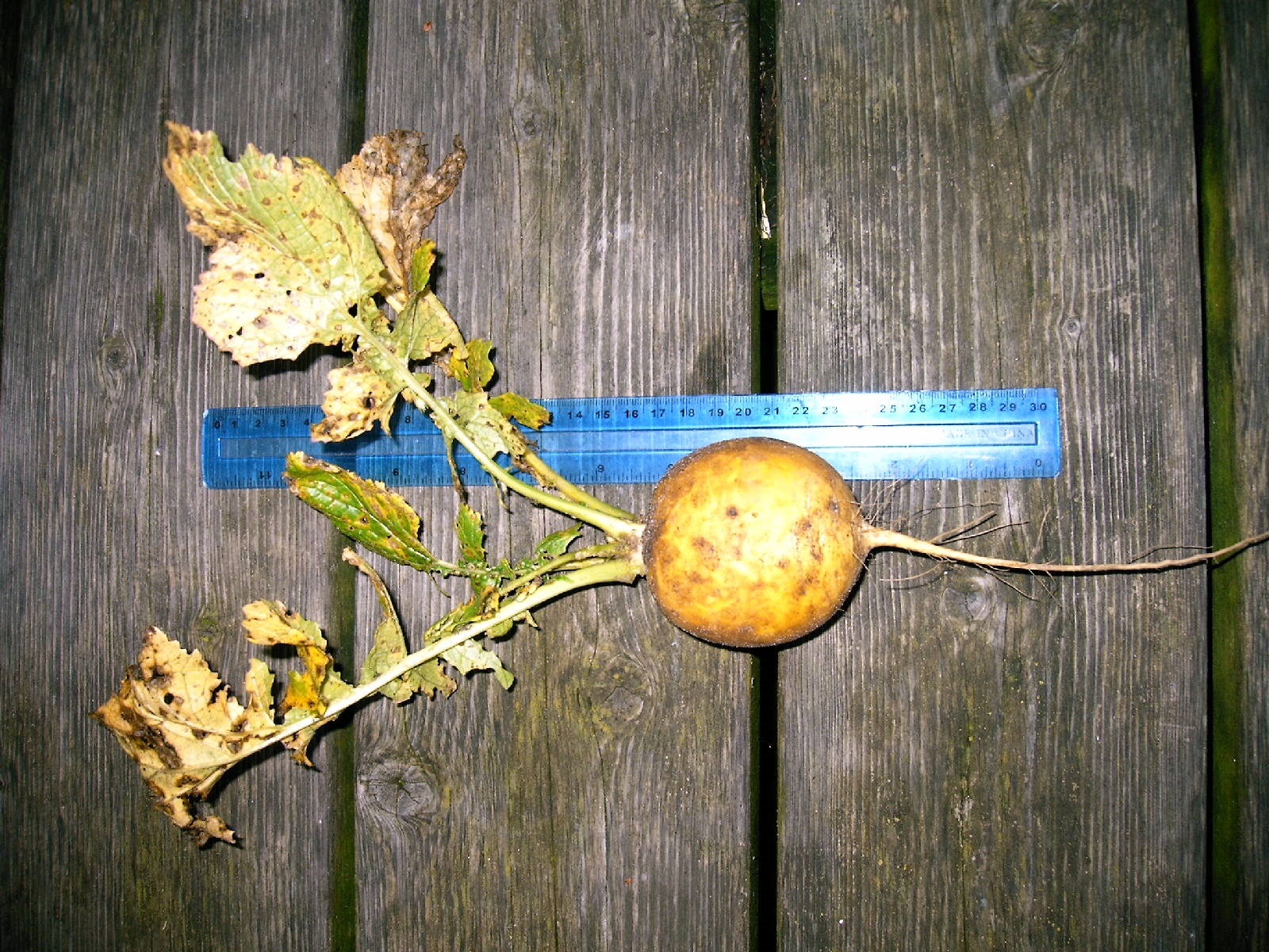 Boterknol bij familie Kuijer in Soest